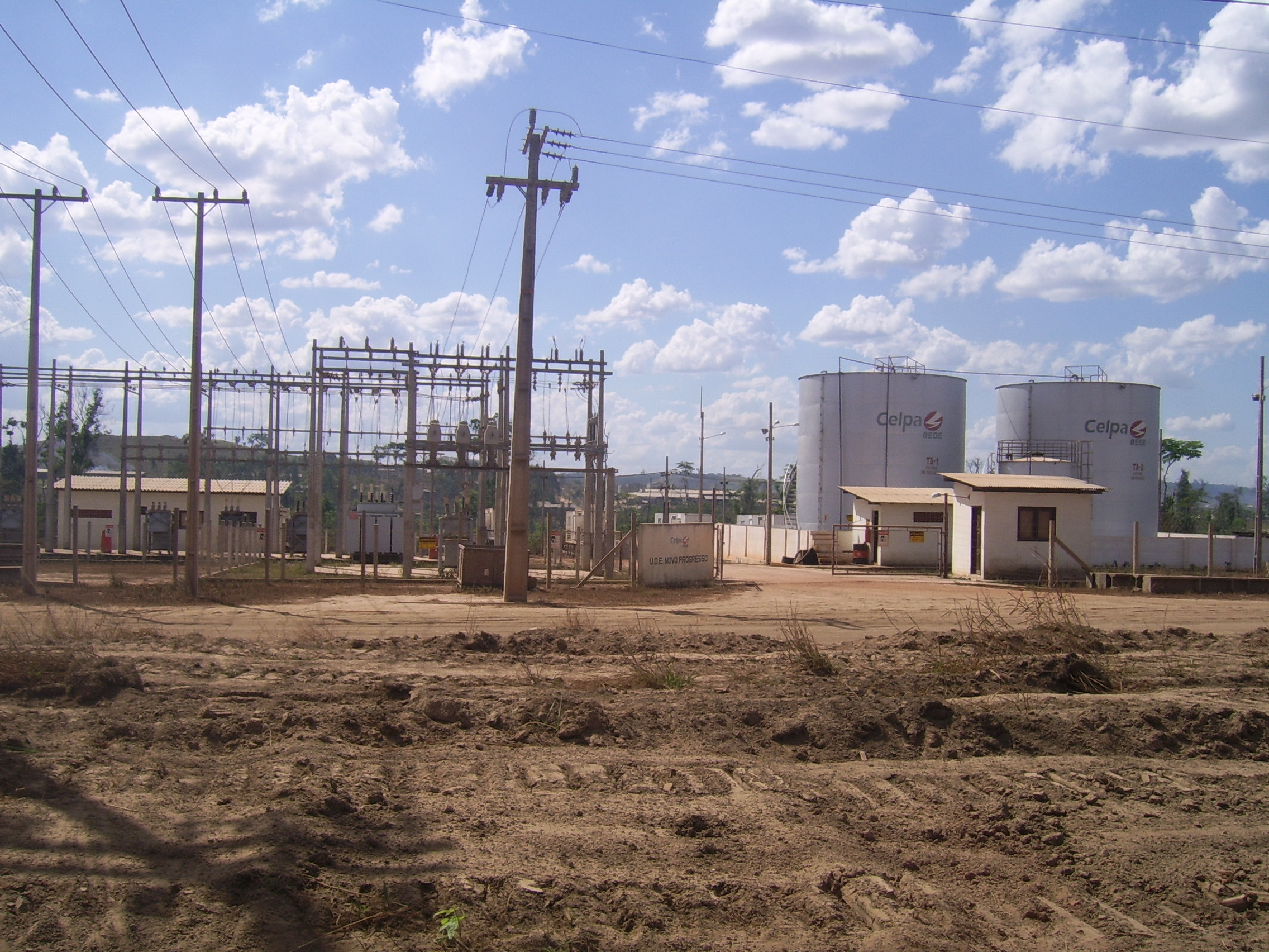 U.D.E. Usina Diselétrica de Novo Progresso, propriedade da Celpa